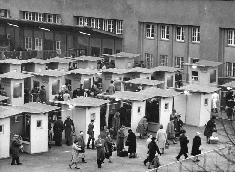 Zentralbild Spremberg 31.10.1964 Vertrag zum Passierscheinabkommen 1964 Zügig und ohne Wartezeiten... verlief am Vormittag des 31. Oktober 1964 die Abfertigung der Westberliner Besucher am Grenzübergang Bahnhof Friedrichstrasse. Auf unserem Bild die aufgestellten Abfertigungshäuschen der Grenzkontrollorgane.